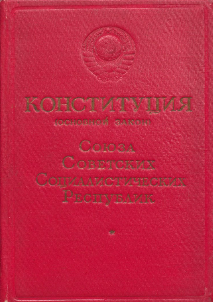 Конституция (Основной закон) Союза Советских Социалистических Республик